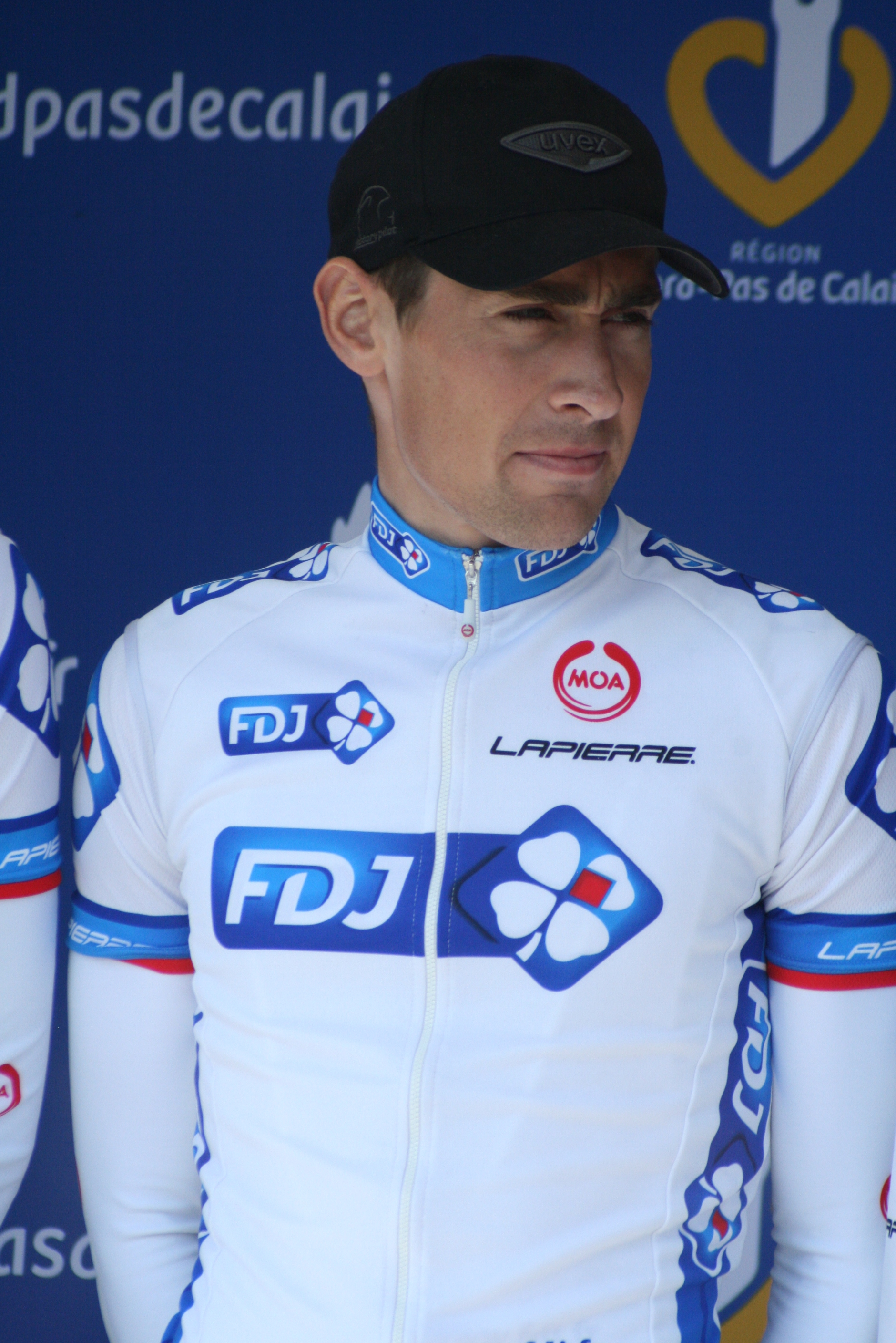 Présentation des coureurs au départ de la première étape Matthieu Ladagnous